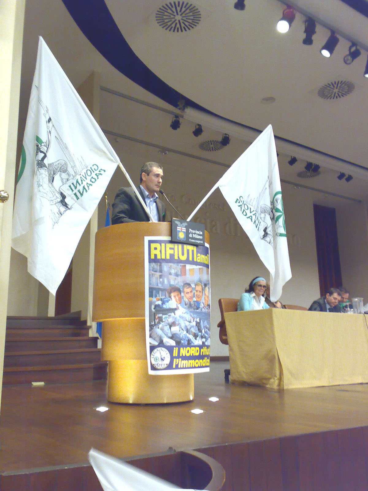 Paolo Grimoldi parla ai Giovani Padani il 30 gennaio 2008.